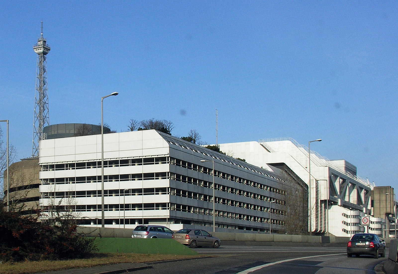 Internationales Congress Centrum Berlin ICC am Berliner Funkturm von der BAB 100 aus fotografiert